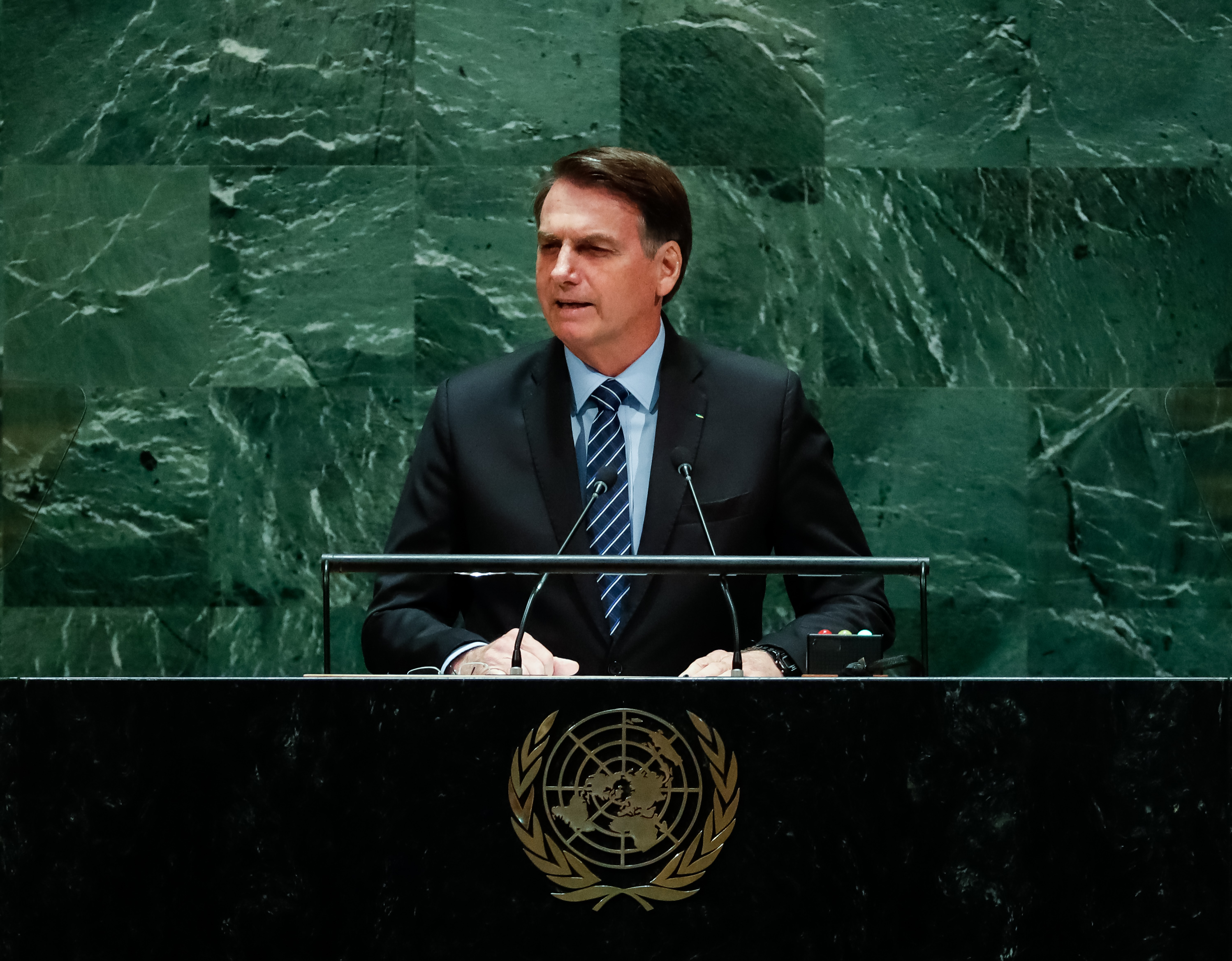 (Nova York - EUA, 24/09/2018) Presidente da República, Jair Bolsonaro, discursa durante a abertura do Debate Geral da 74ª Sessão da Assembleia Geral das Nações Unidas (AGNU).Foto: Alan Santos/PR